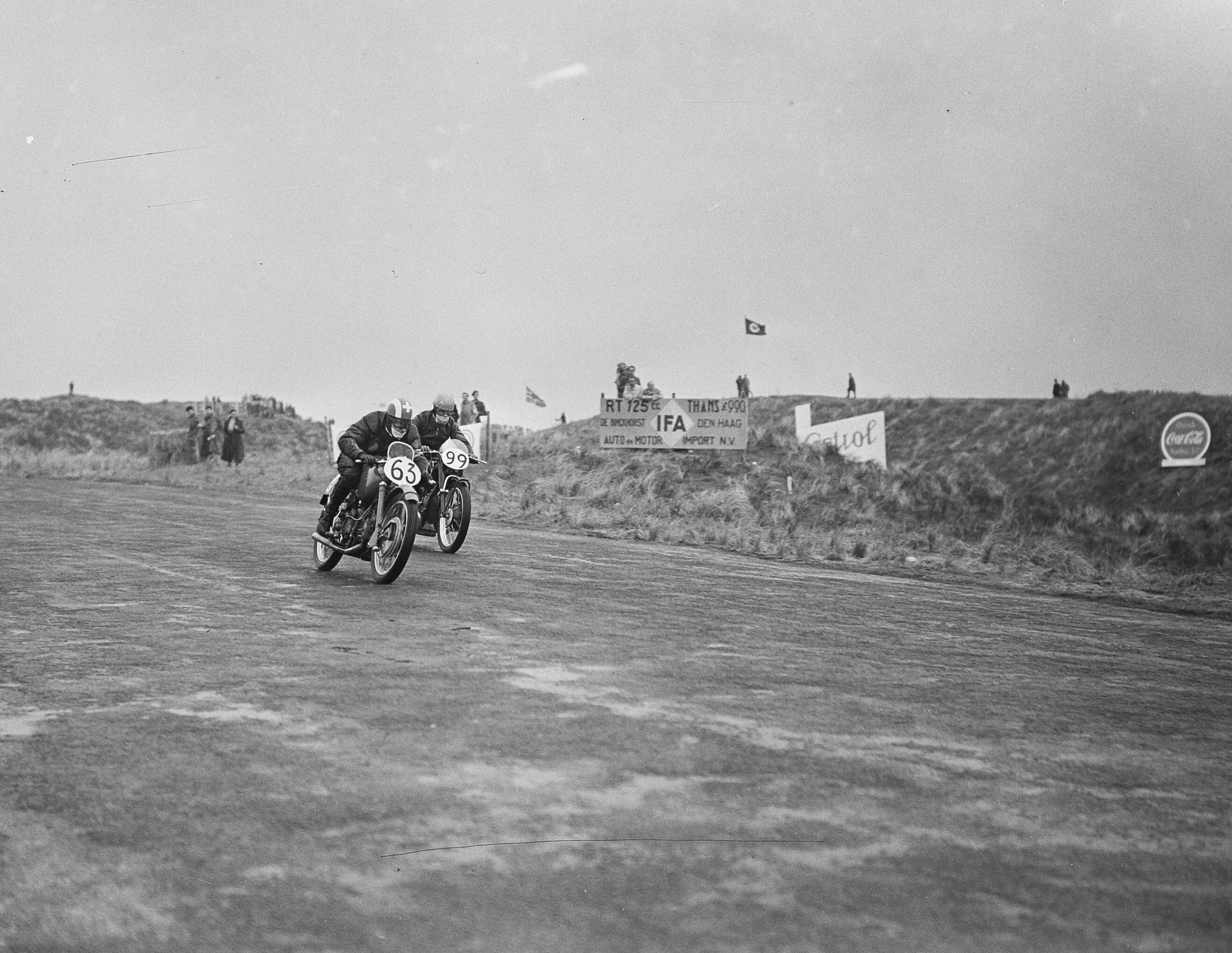 Collectie / Archief : Fotocollectie Anefo Reportage / Serie : [ onbekend ] Beschrijving : Motorraces te Zandvoort Krijnenburg (99) Datum : 6 mei 1951 Locatie : Noord-Holland, Zandvoort Trefwoorden : MOTORRACES Fotograaf : Bilsen, Joop van / Anefo Auteursrechthebbende : Nationaal Archief Materiaalsoort : Glasnegatief Nummer archiefinventaris : bekijk toegang 2.24.01.09 Bestanddeelnummer : 904-5530